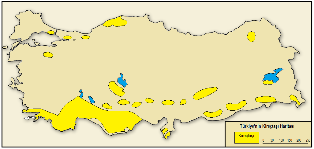 Kireçtaşı üzerindeki karstik şekillerin bulunduğu araziler